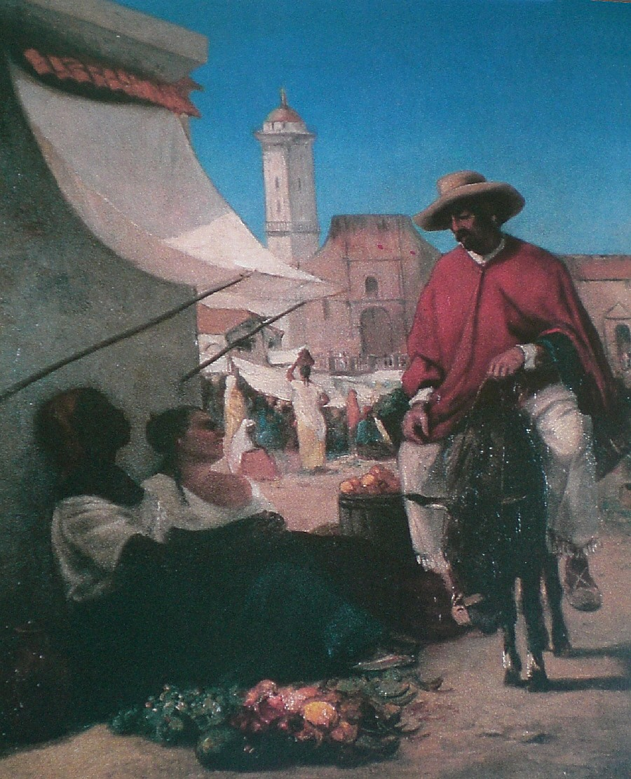 Plaza Mayor, Caracas, mid XIX century